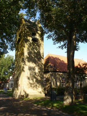 Klokkentoren van Ballum Nedersaksies: Amelaand_karke.jpg